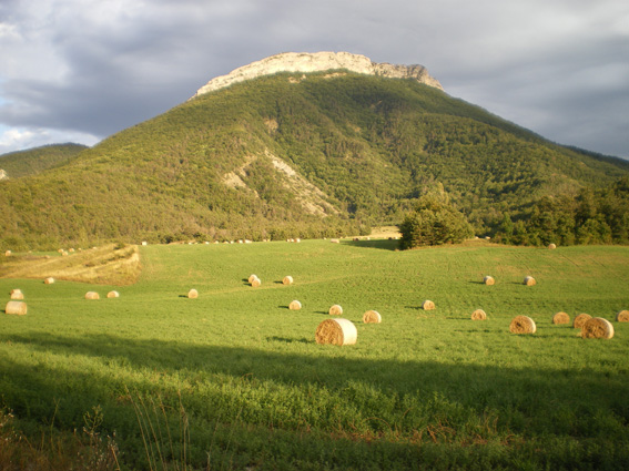 Le Roc de Longue dent, Chabestan, Pays du Buëch, Hautes-Alpes.